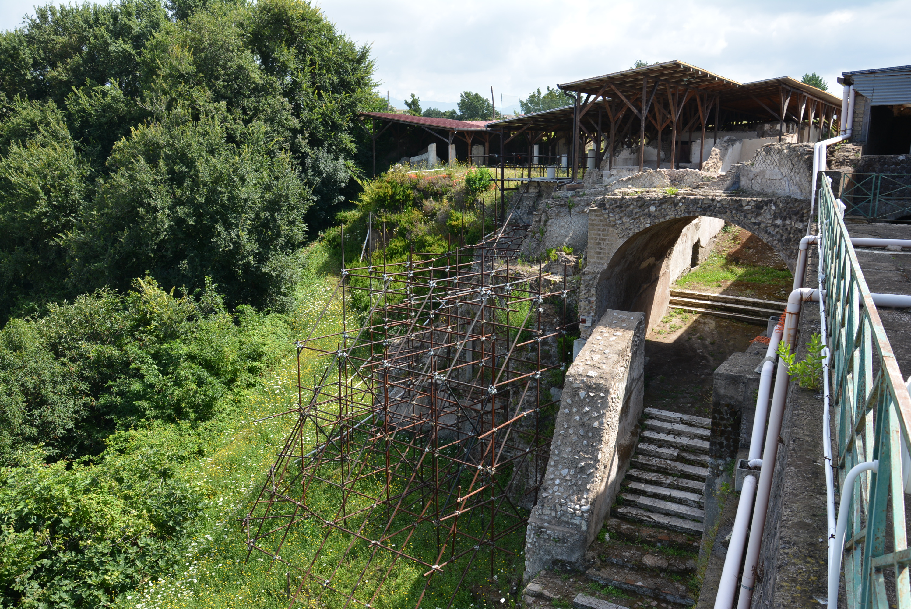 Villa San Marco, Stabia - MIBAC This is a photo of a monument which is part of cultural heritage of Italy.